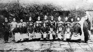 中文（中国大陆）: 1907年上海救火联合会成立时官绅合影